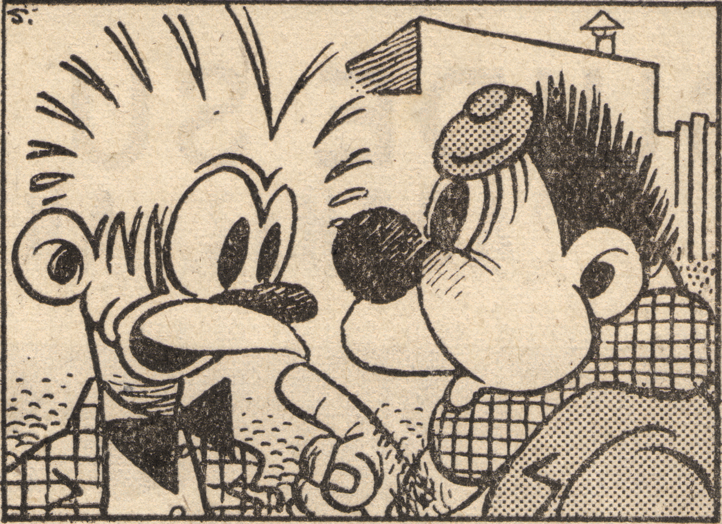 Peloduro y El Pulga. Personajes de la historieta Peloduro, de Julio E. Suárez. Dibujo extraído del número 59 de la revista Peloduro, del 6 de noviembre de 1946.